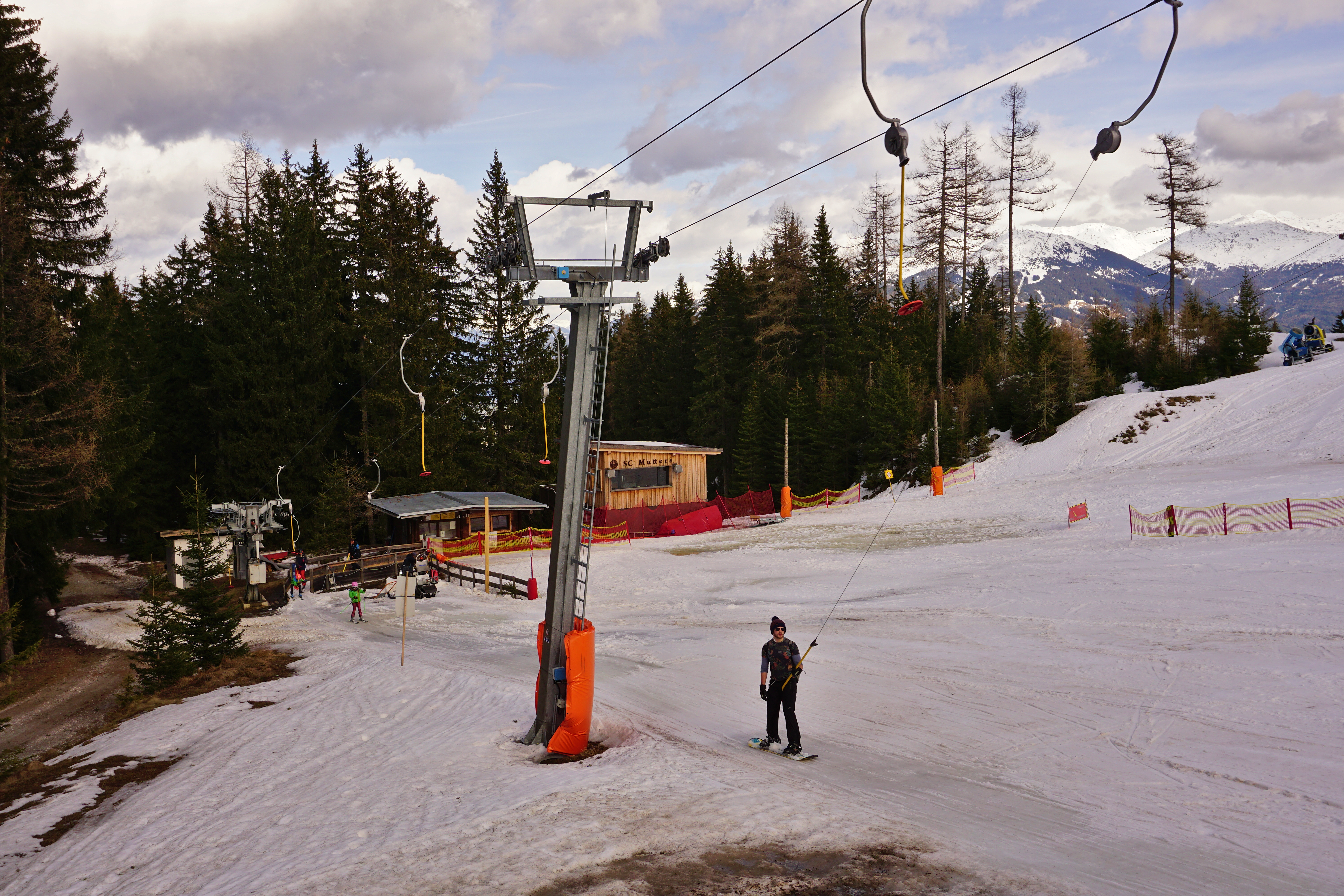 Schlepplift Almboden im Schigebiet Muttereralmbahn